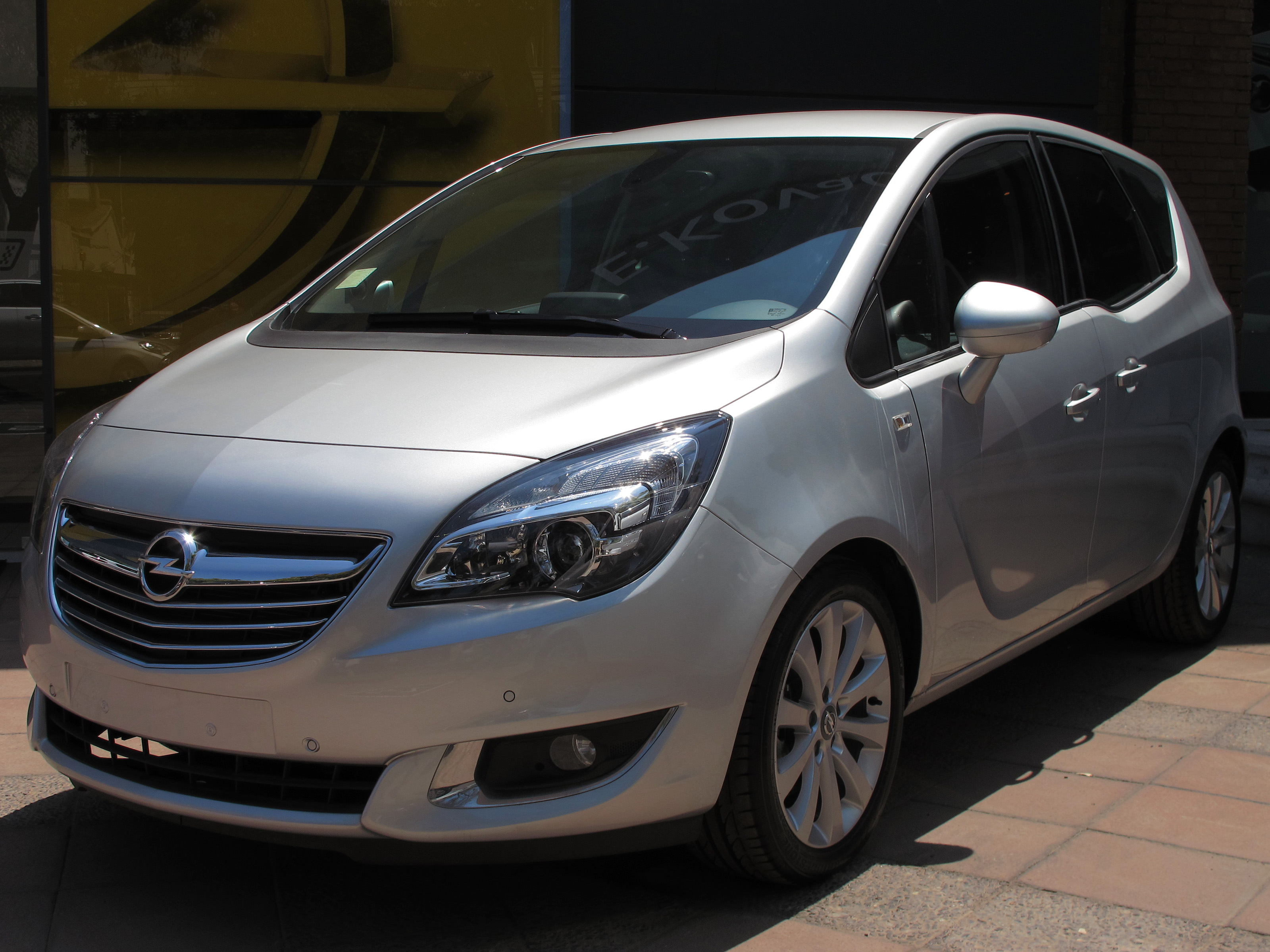 Opel Meriva 1.4T Cosmo 2015